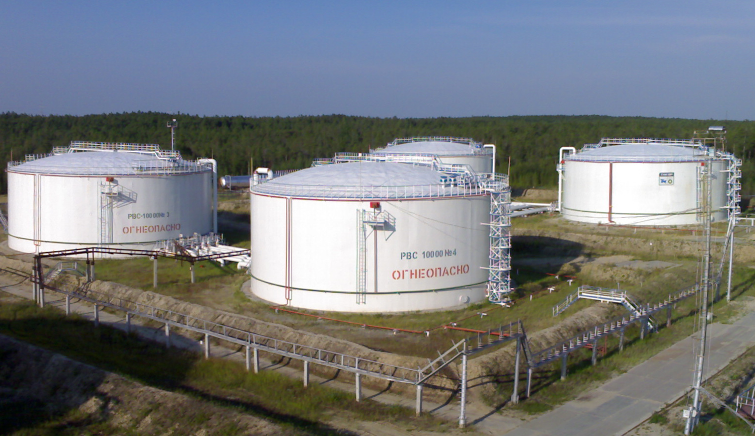 Товарный парк и очистные сооружения (ЦПС Южный, ТНК-Нягань). 2006.